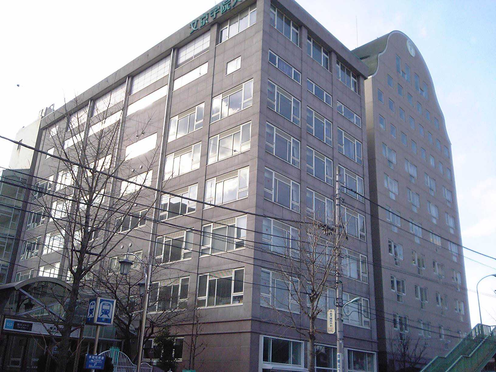 文京学院大学（2007年1月8日投稿者が撮影）